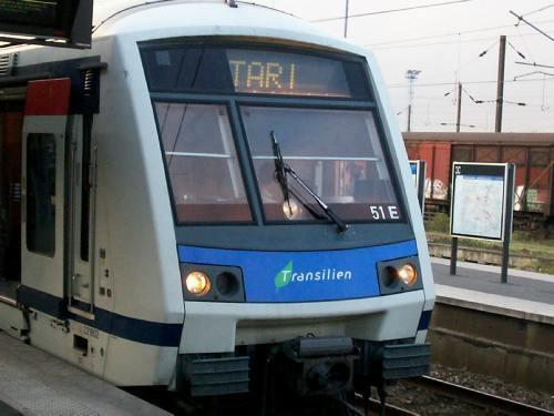 Z22500 assurant une mission exceptionnellement omnibus, à Noisy-le-Sec, sous le nom de TARI (actuel TOHA)